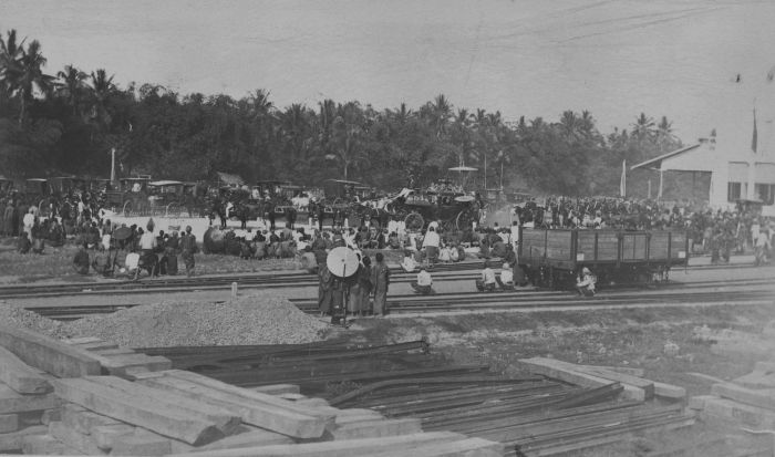 foto. Een menigte aanschouwt bij spoorwegstation van Jogjakarta de staatsiekoets met daarin waarschijnlijk de Sultan van Jogjakarta of de Susuhunan van Solo, die wordt gevolgd door een militair escorte te paard van het KNIL